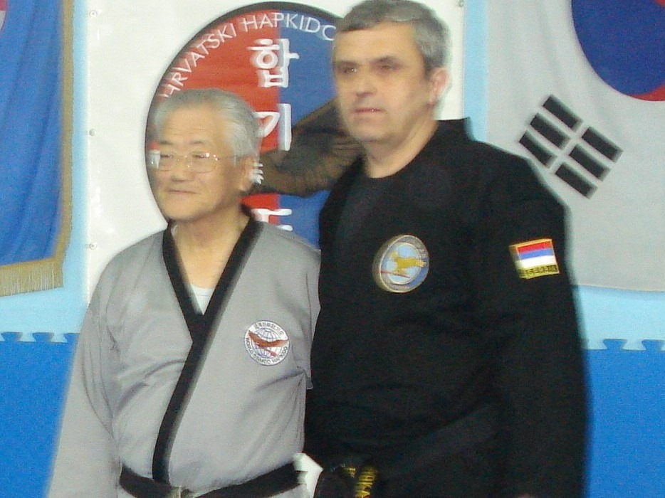 Борис Кривокапић са оснивачем Хапкидоа велемајстором Ђи Хан Ђеом (Ji Han Jae)